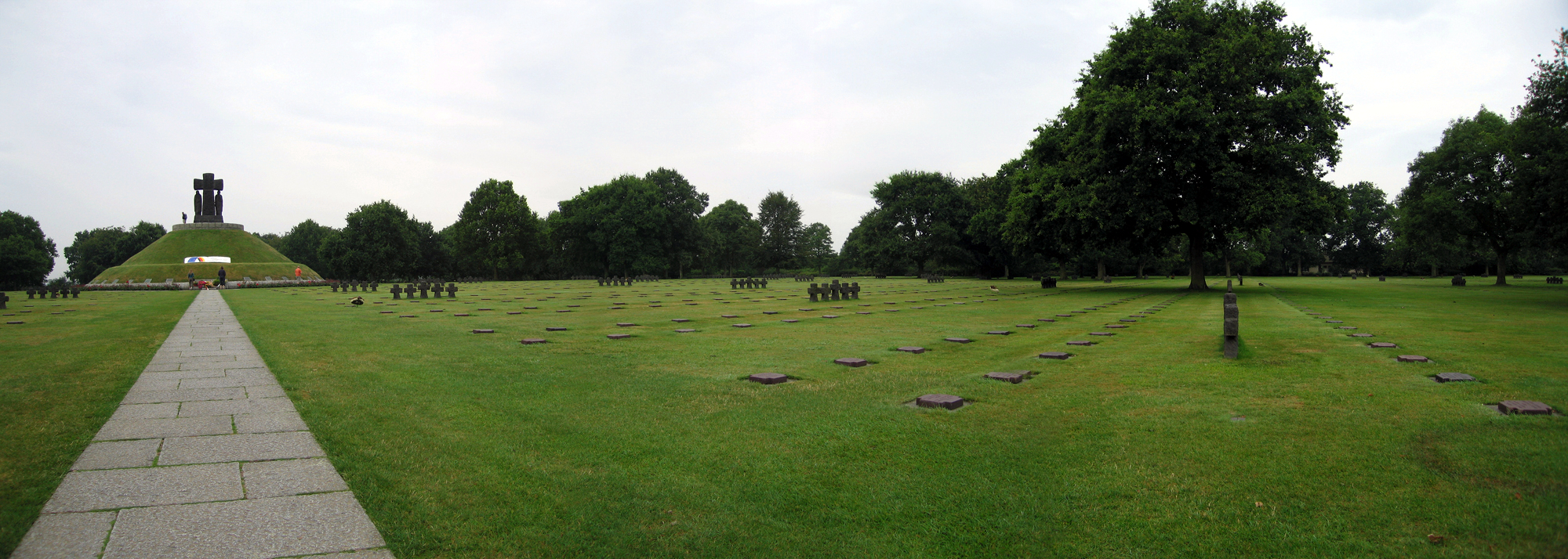 Panorama du Cimetière allemand de La Cambe (Calvados, Basse-Normandie)